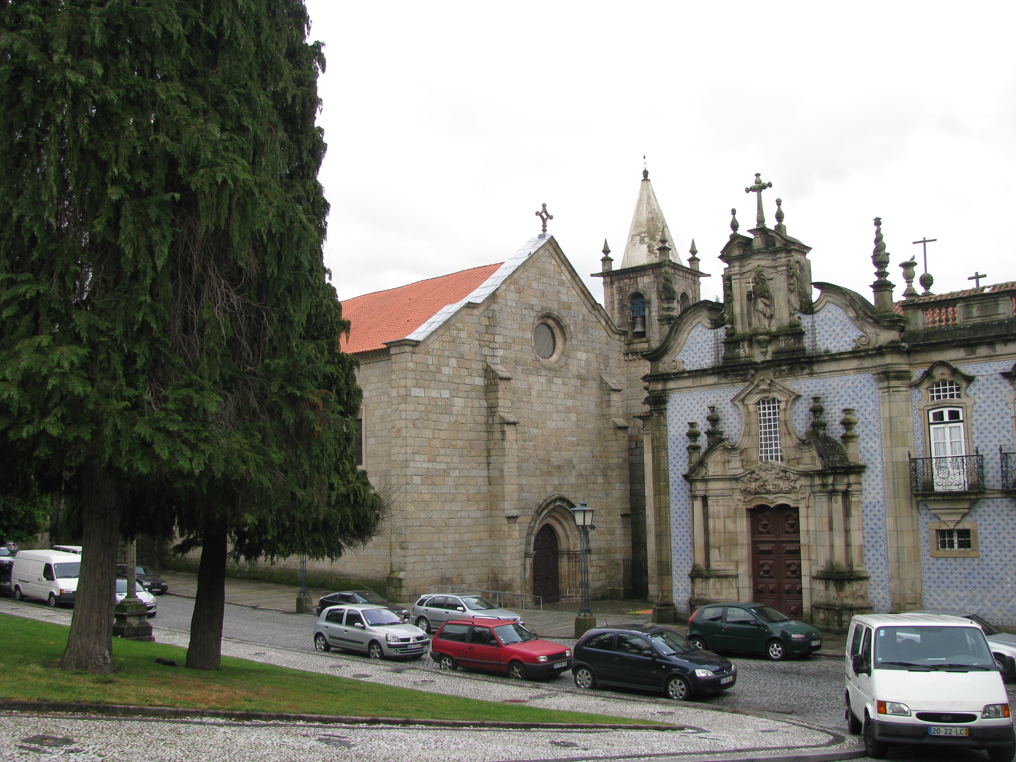 Igreja de S. Francisco This file was uploaded for Wiki Loves Monuments in Portugal with the unique identifier 74957.